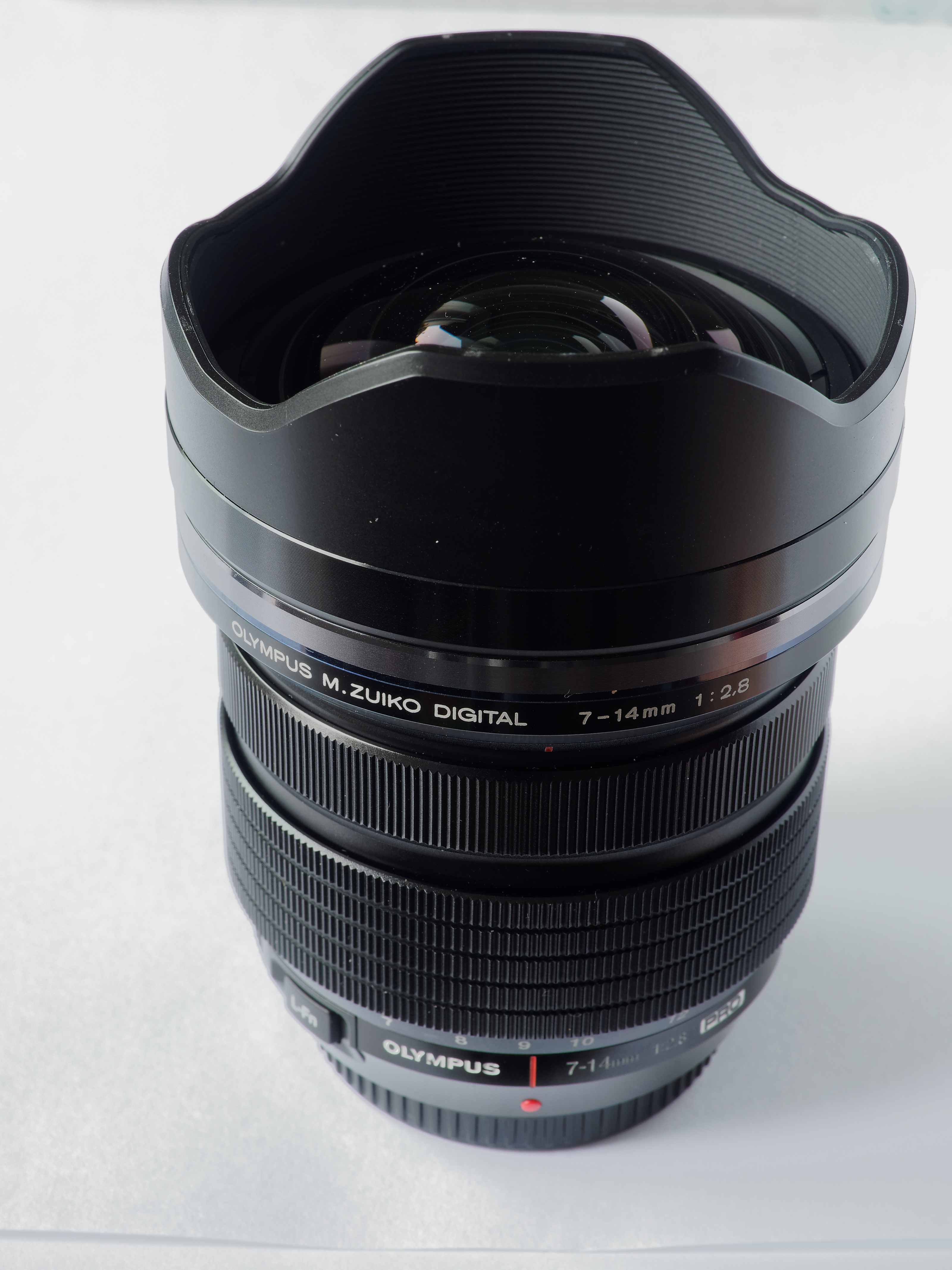 Micro Four Thirds Objektiv OLYMPUS M.ZUIKO DIGITAL 7-14mm f2,8 PRO